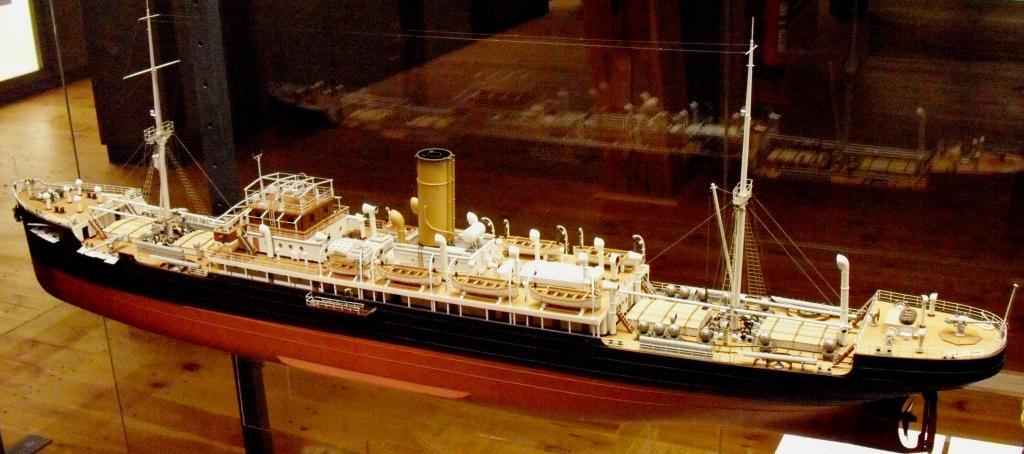 Modell des ehemaligen Bananentransporters Pungo als Hilfskreuzer Möve